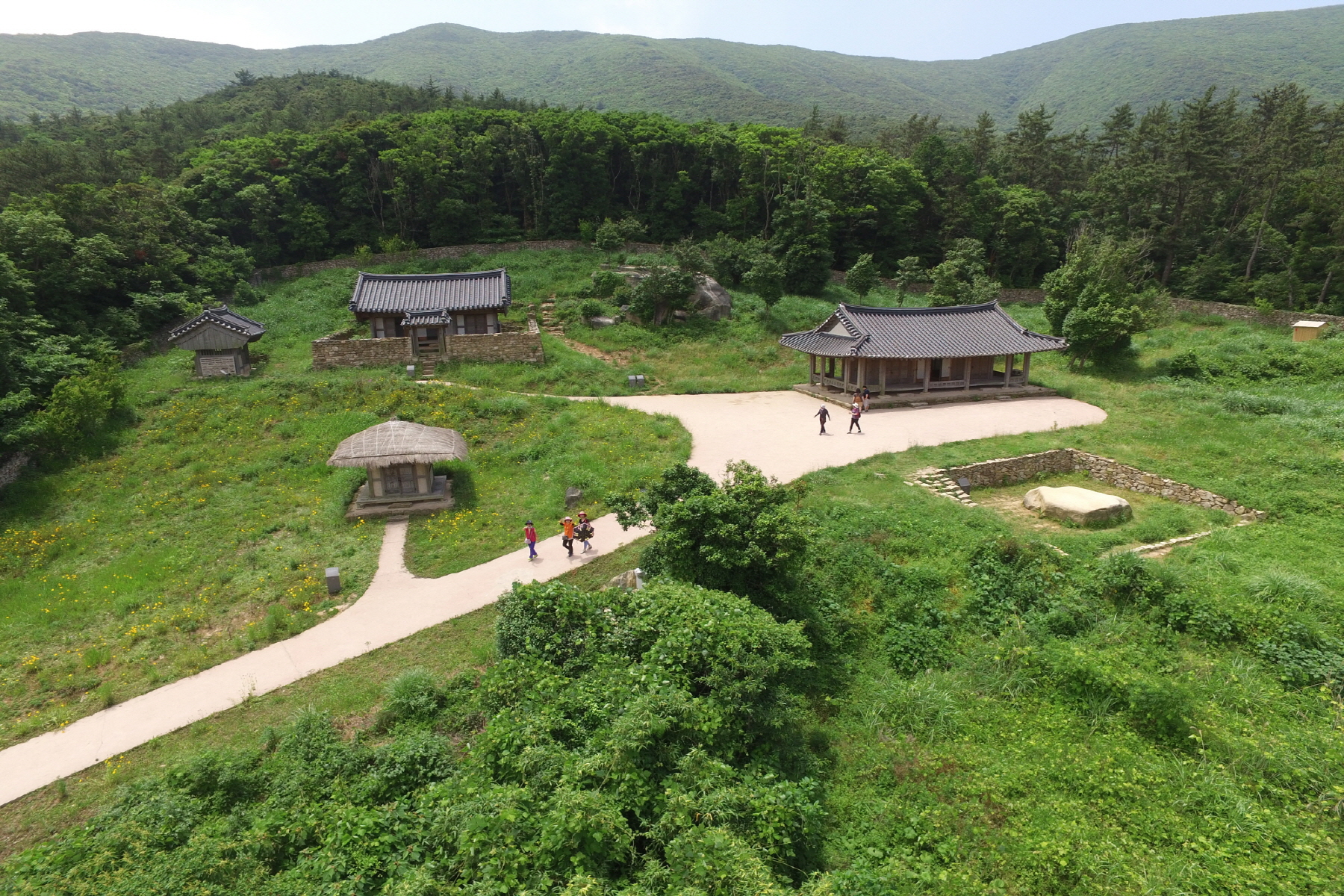 보길도 윤서도 원림중에서 낙서재 지역은 윤선도의 주거공간으로 삼았던 곳이다. 낙서재는 독서를 즐기며 학문하는 선비의 삶을 상징한다.